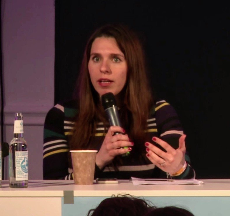 Find out more at: Die Digitalisierung der Arbeitswelt und die damit verbundene Flexibilisierung von Arbeitszeit und -ort verändert alles: Gehören Frauen zu den Profiteurinnen der Digitalisierung oder verstärkt die digitale Transformation bestehende Ungleichheiten zwischen den Geschlechtern? Das Panel nimmt die oft vernachlässigten geschlechterspezifischen Dimensionen der Arbeitswelt 4.0 in den Blick. Valentina Kerst Ulrich Reinhardt Julia Gebert Tanja Carstensen Creative Commons Attribution-ShareAlike 3.0 Germany (CC BY-SA 3.0 DE)